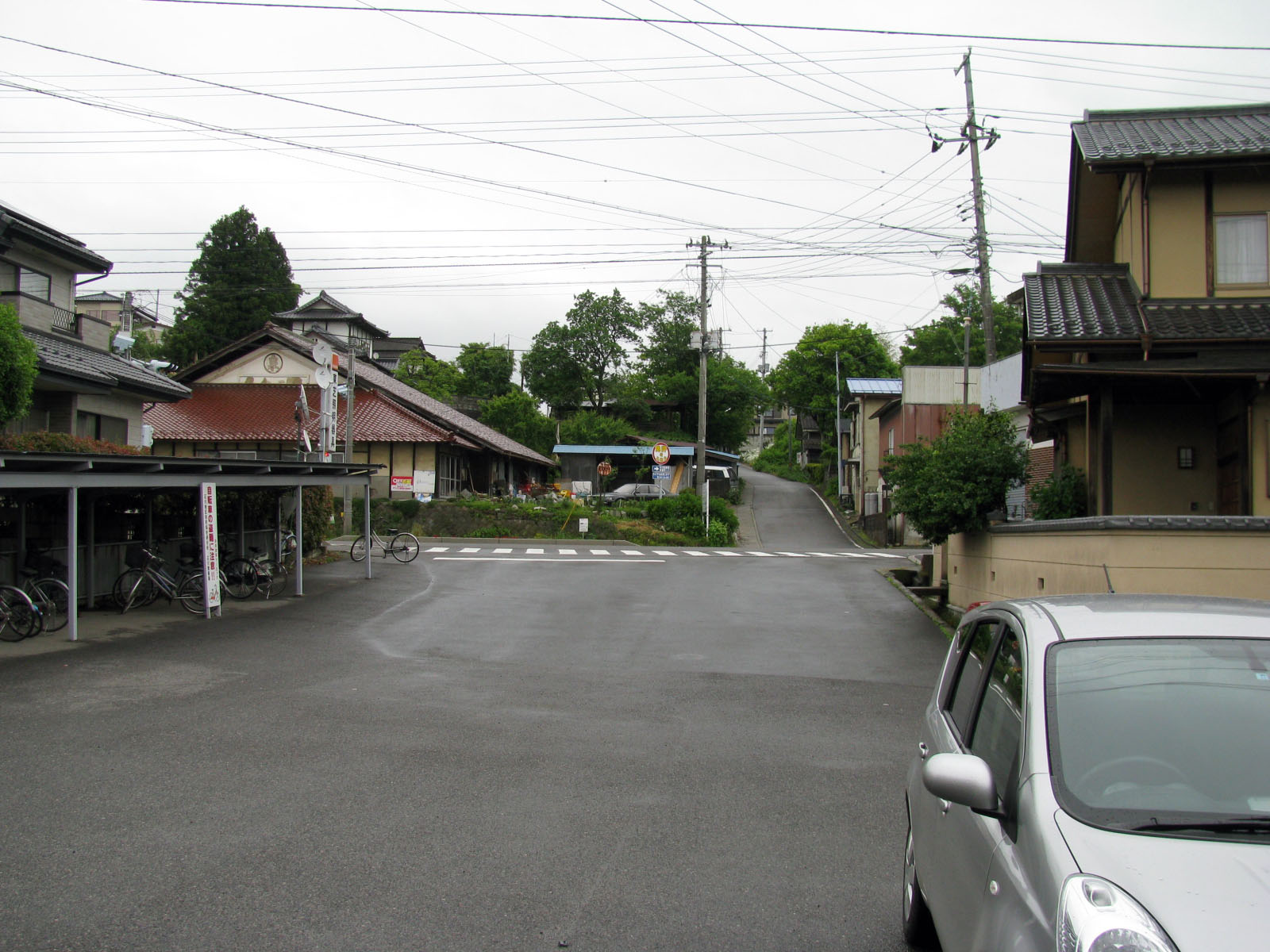 水郡線泉郷駅